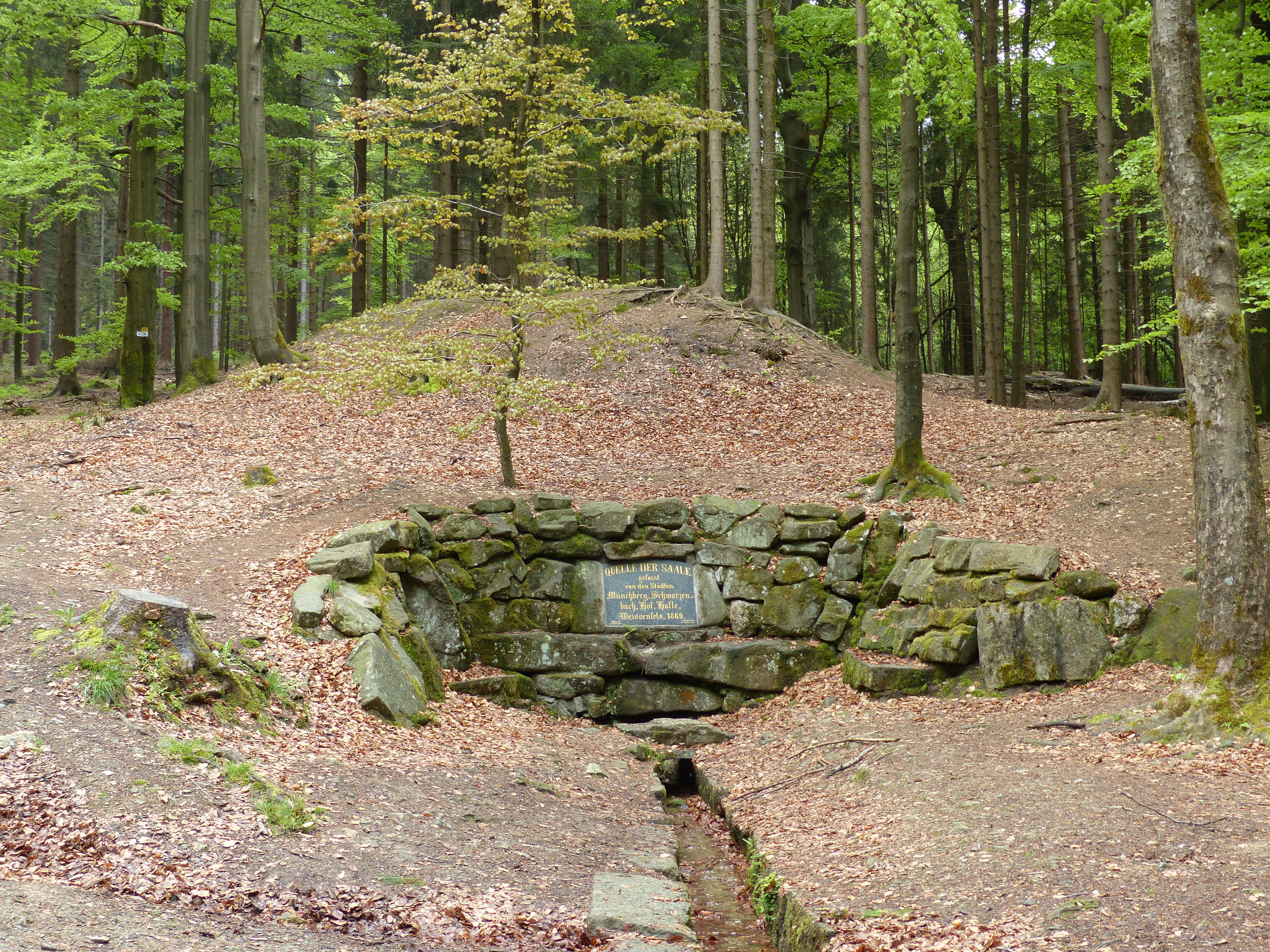 Ansicht des Saalequelleareals